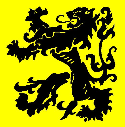 Een Vlaamse leeuw zonder rood.